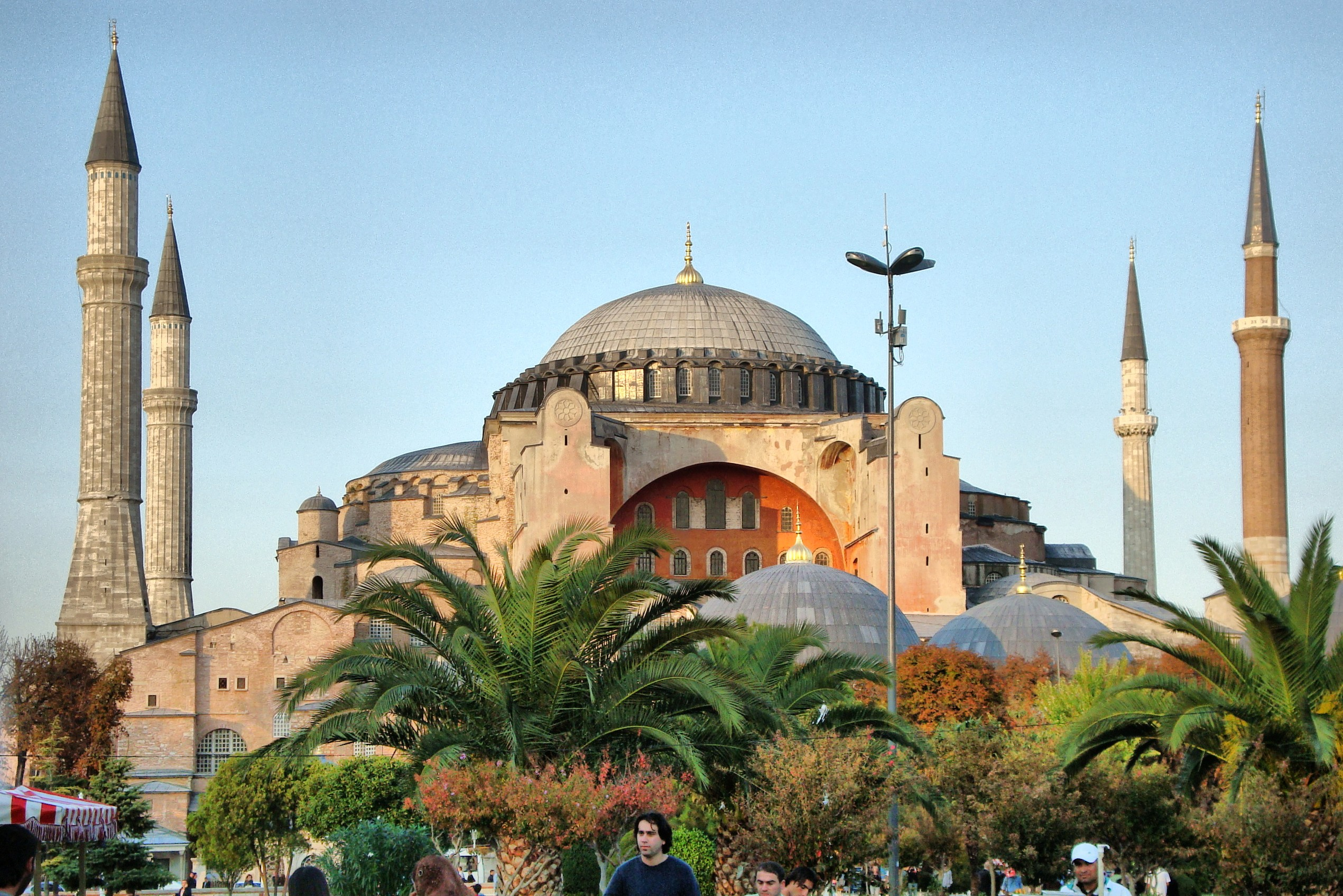 AYASOFYA